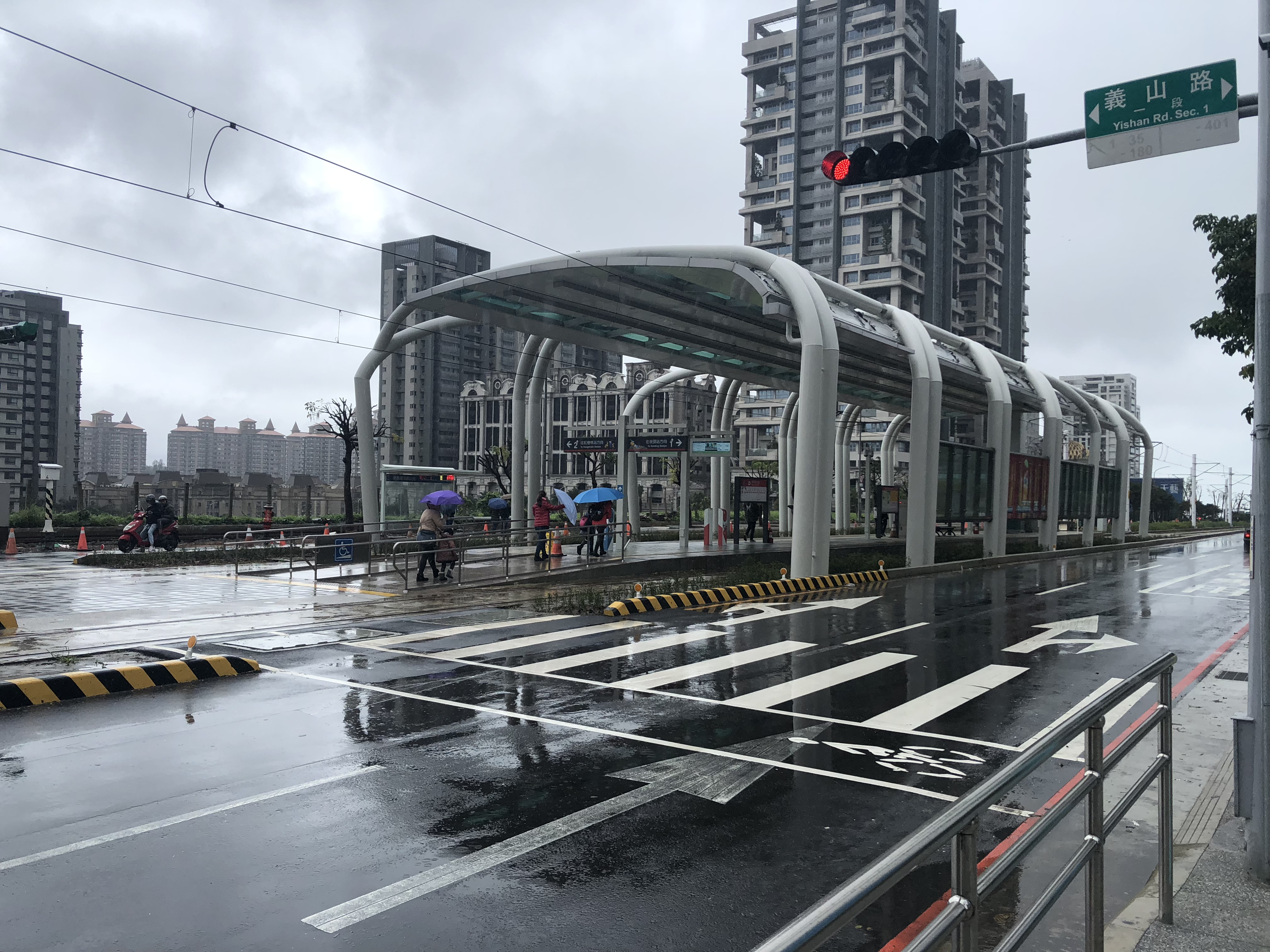 濱海義山站